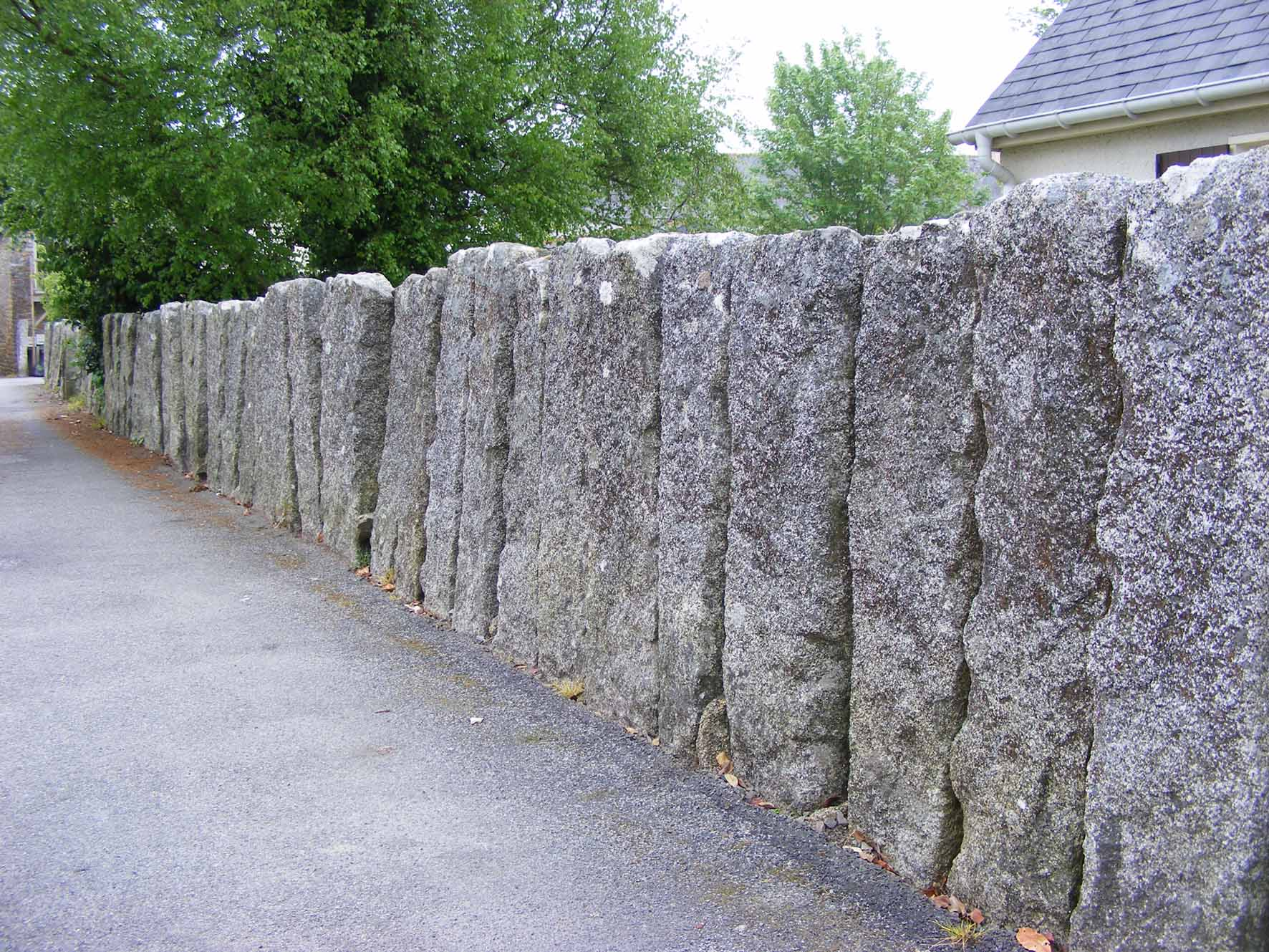 Venelle de Men zao, de pierres debout, dans le bourg de Nevez, en face de l'église